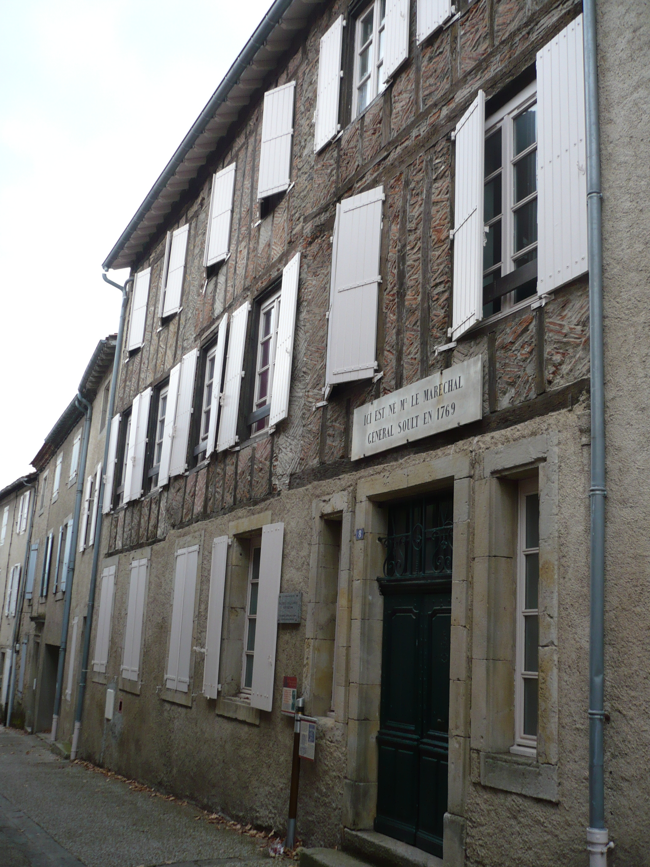 Maison où naquit en 1769 le Maréchal et Duc de Dalmatie Jean Soult sur la commune de Saint-Amans-Soult dans le département français du Tarn.